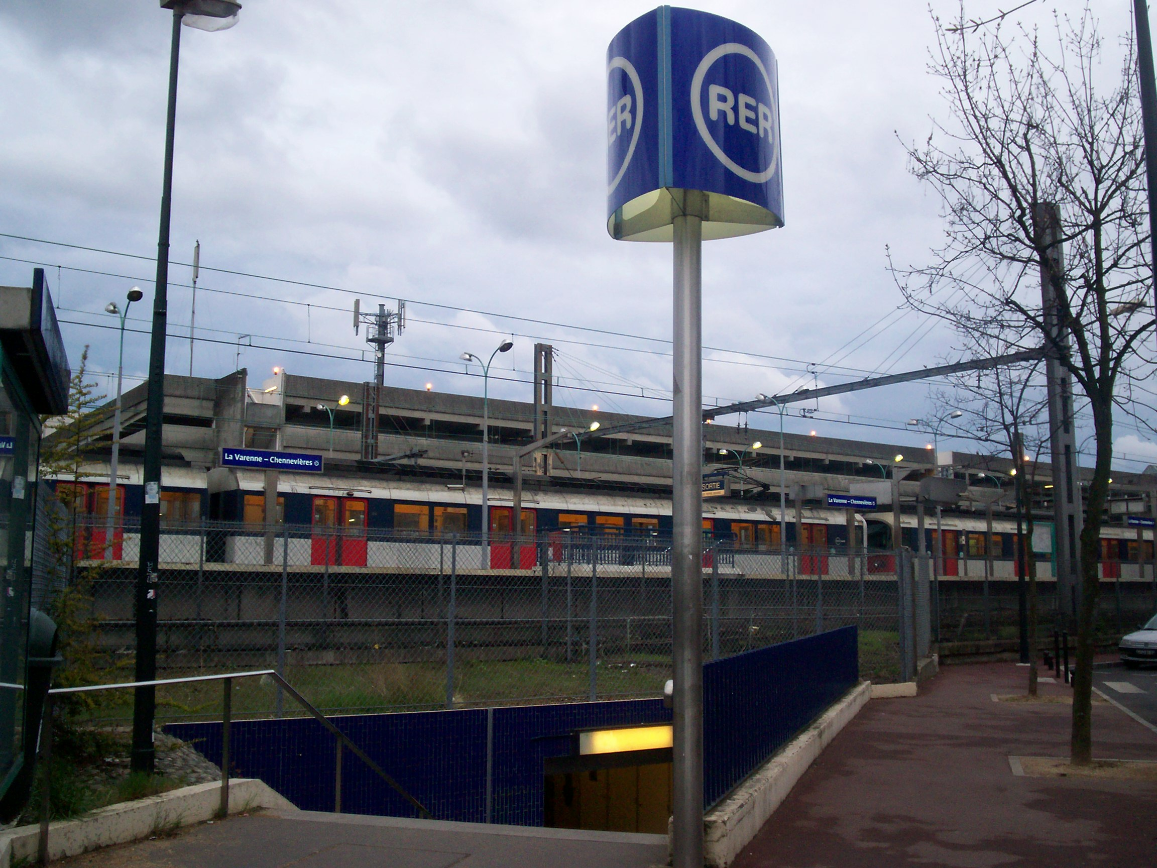 MS 61 - Gare de La Varenne-Chennevières